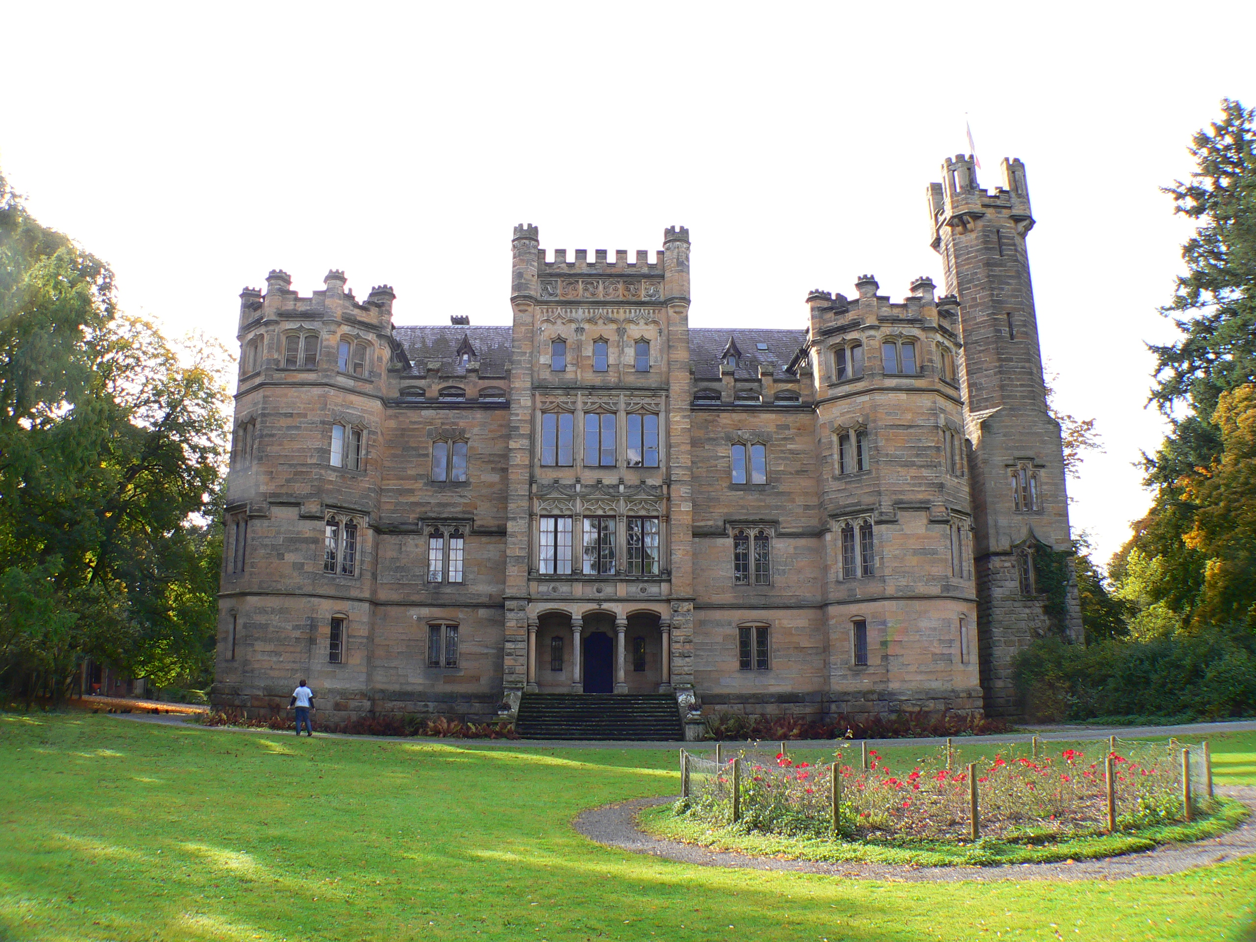 Schloss in Küps-Oberlangenstadt, Bayern, Regierungsbezirk Oberfranken, Landkreis Kronach - Frontseite